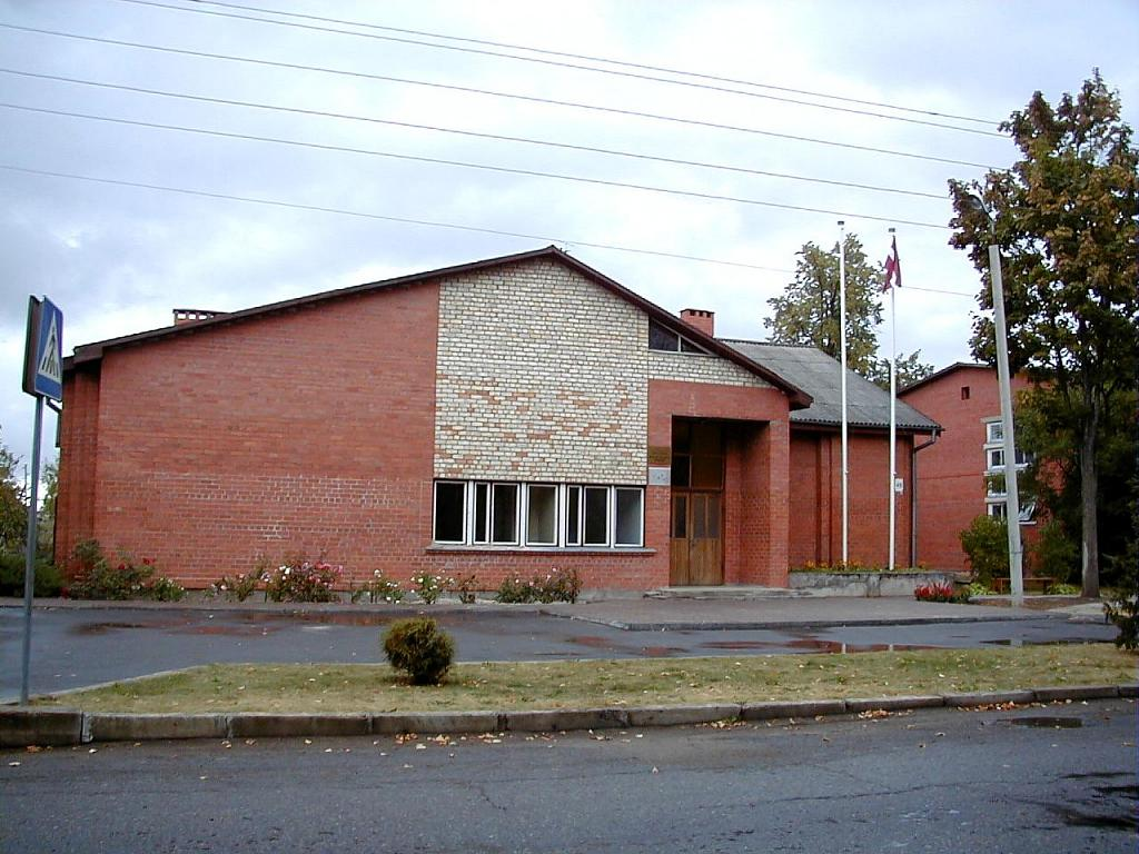 Rugāju pagastnams 2002-09-14